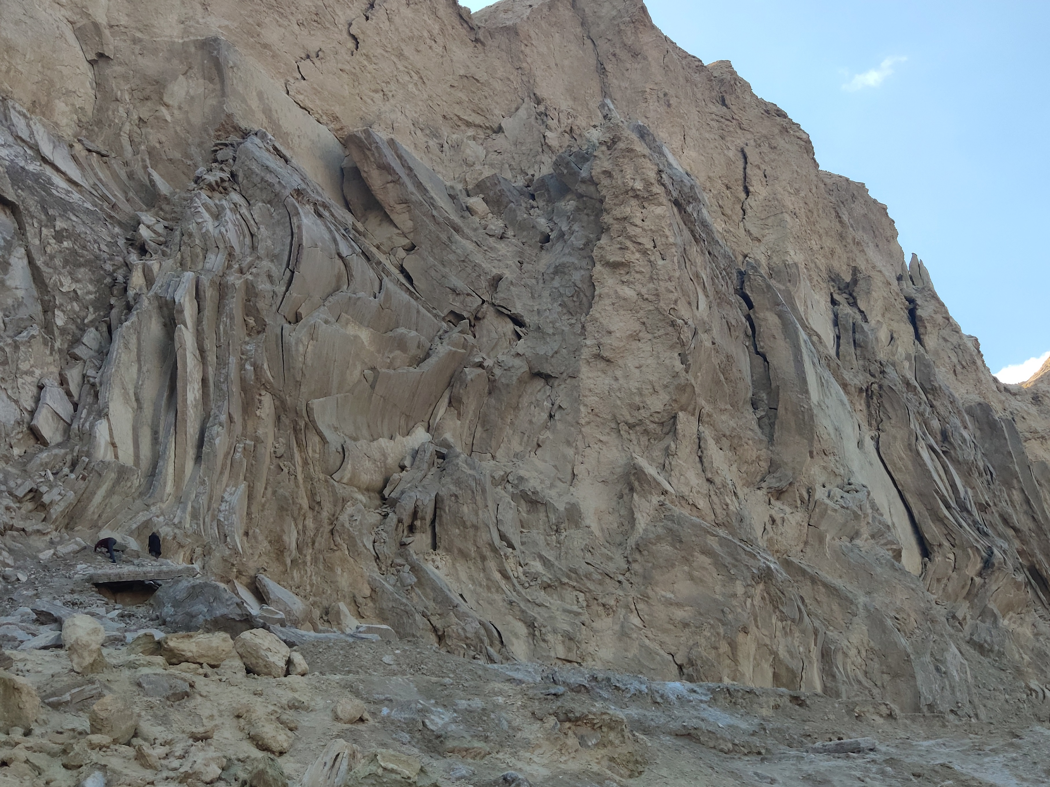 שכבות מלח אנכיות בהר סדום